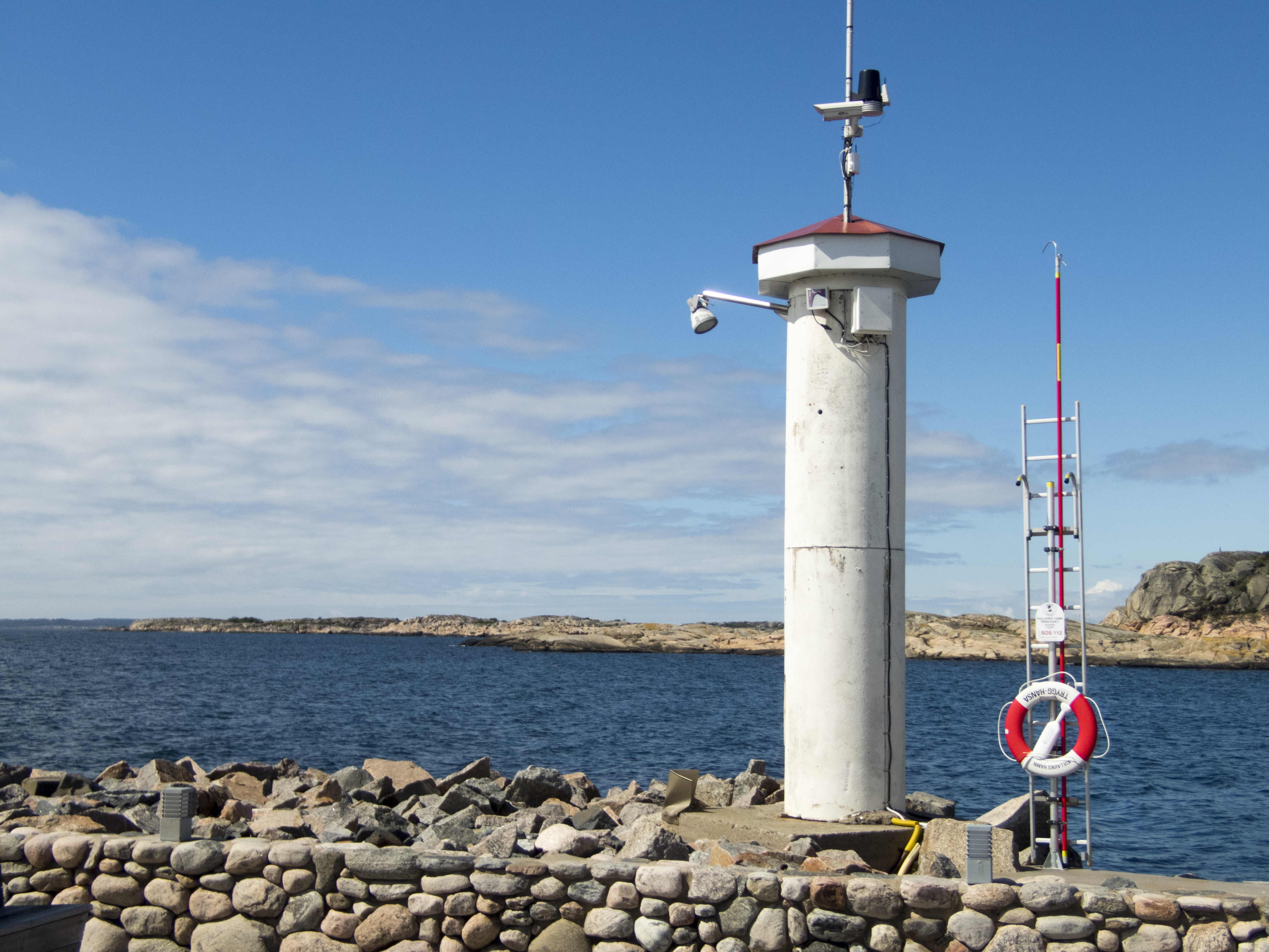 Kullaviks båthamn